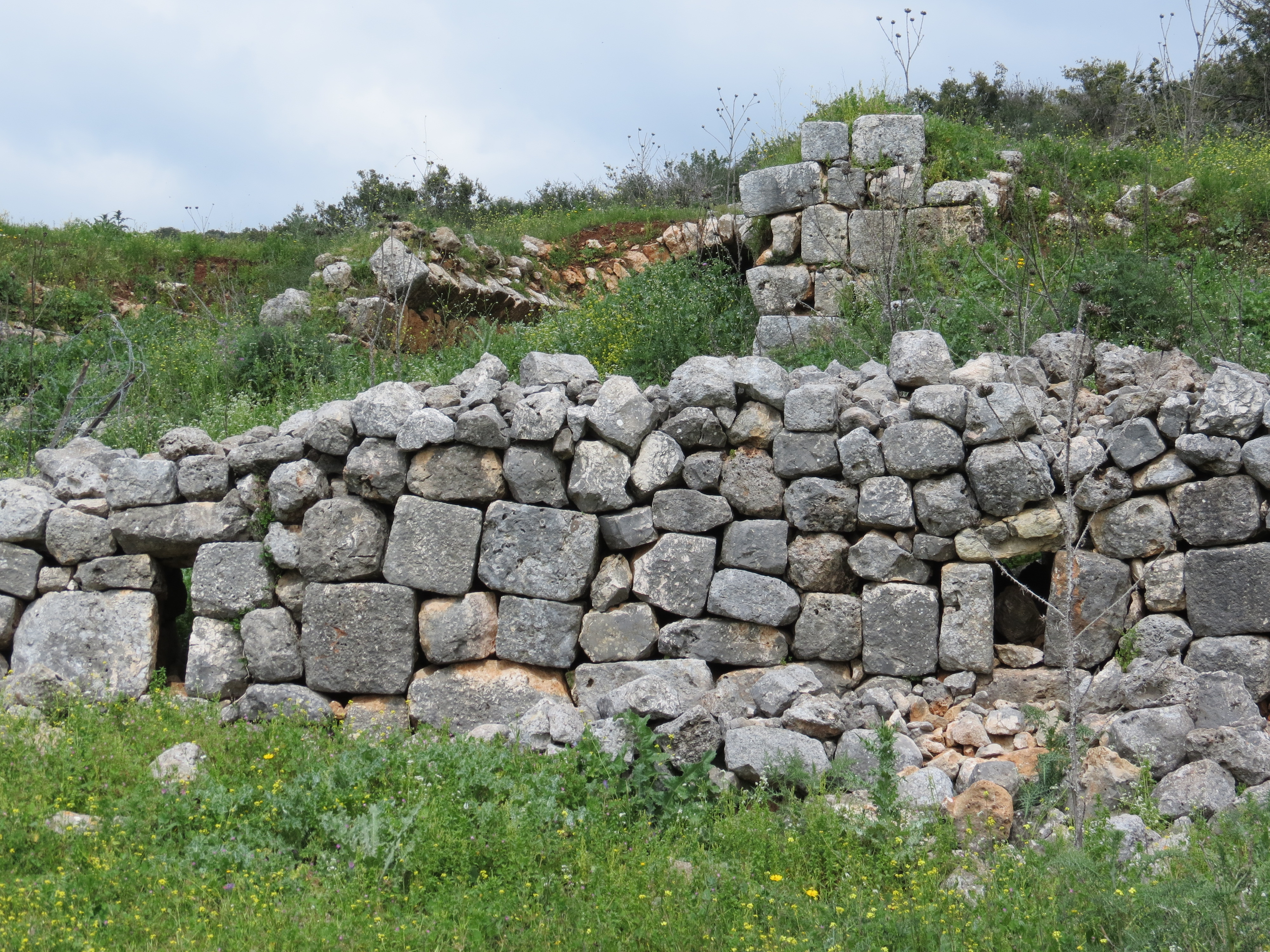 חורבת מחוז